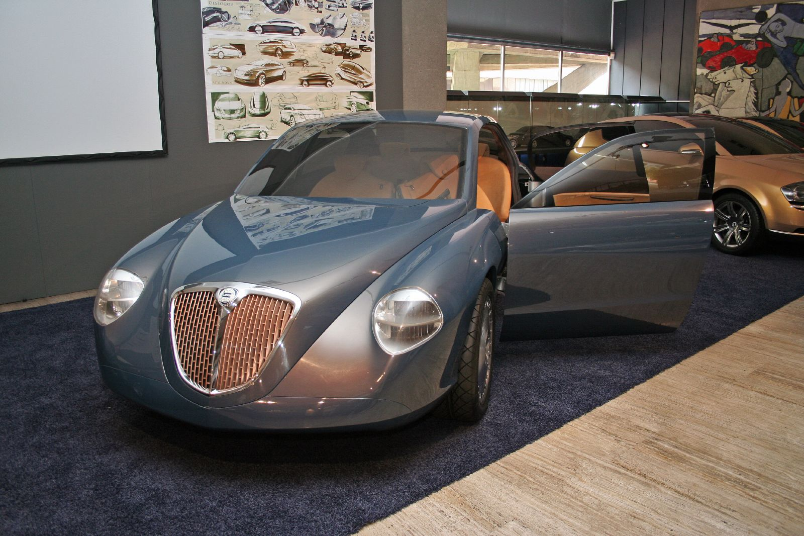 Lancia Dialogos prototipo Centro Stile Lancia del 1998